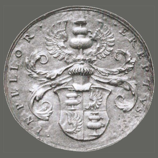 Münze mit gebessertem Wappen von Ambrosius Volland (Stadtarchiv Markgröningen)